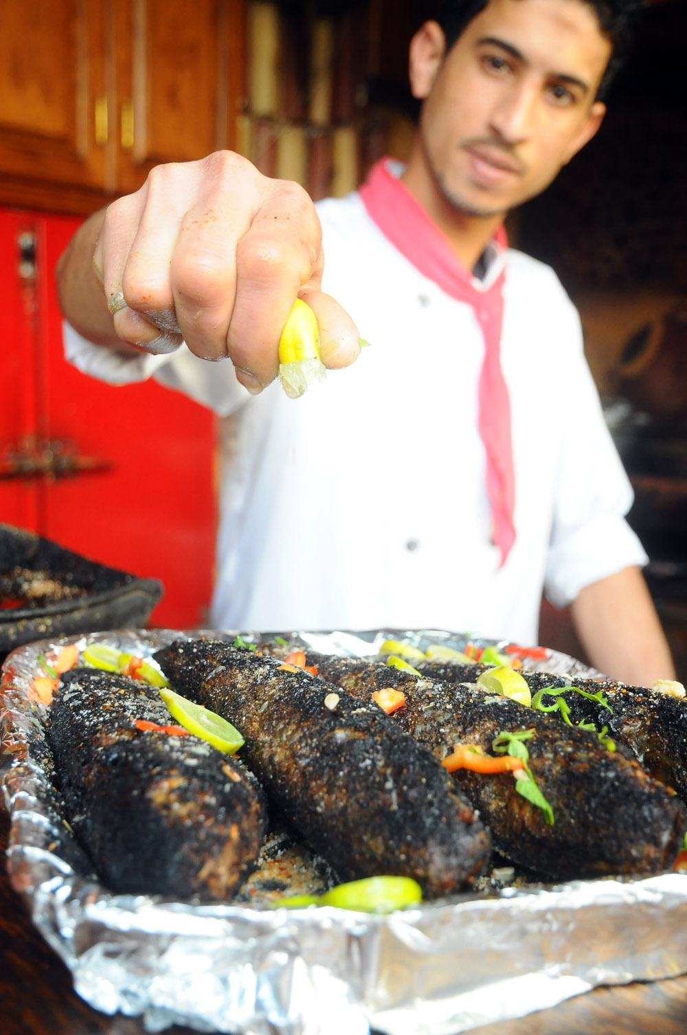 مصرى: يضاف الليمون على السمك المشوى قبل الاكل This is an image of food from Egypt